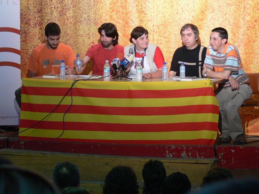 Presentació del seu llibre junt amb el Roc Casagran a l'Acampallengua de l'any 2006. Ses Illes.